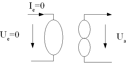 Nullor-Symbol. GNU-FDL, selbst erstellt